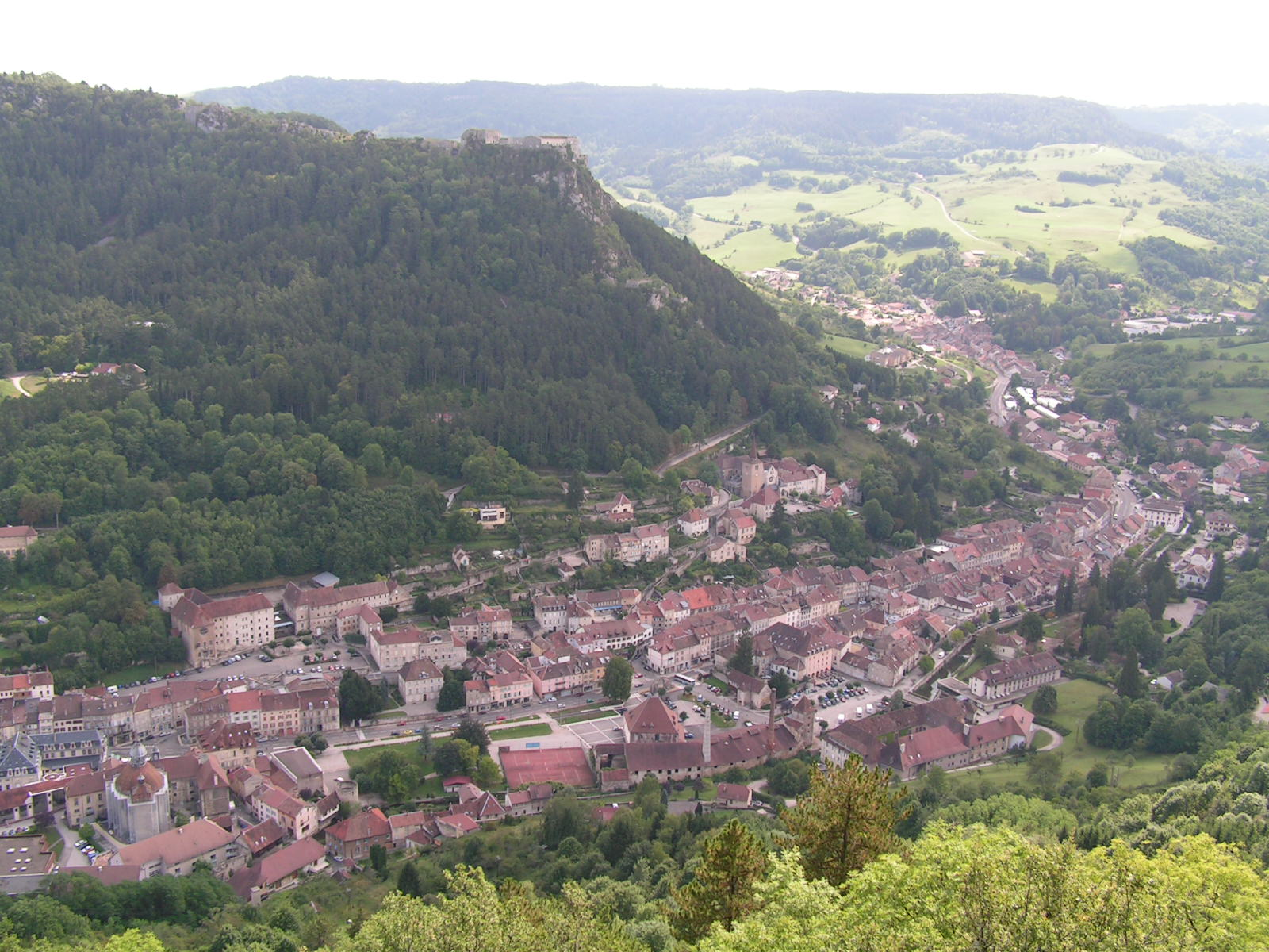 Salins-les-Bains (39), Oberstadt